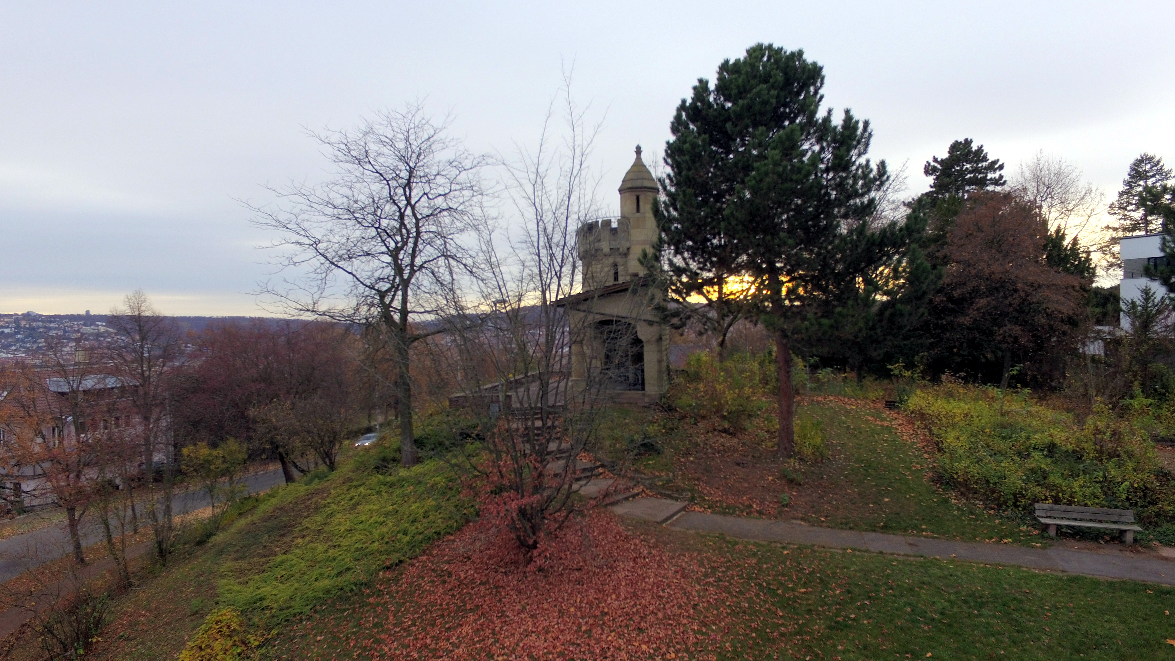 Luftaufnahme des Kriegbergturms in Stuttgart aus Richtung Nord-Ost